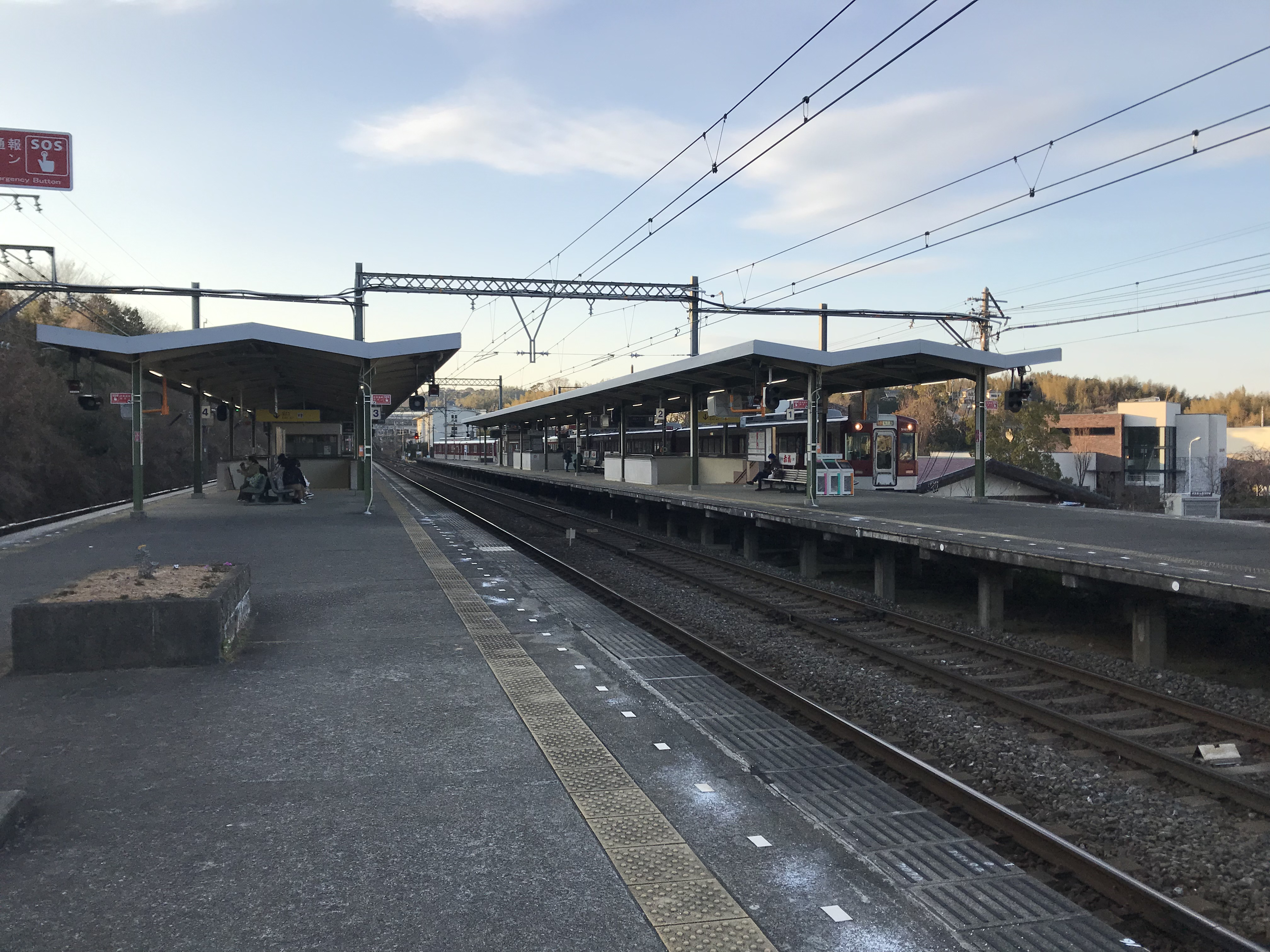 五十鈴川駅のホーム(奥は宇治山田方面)